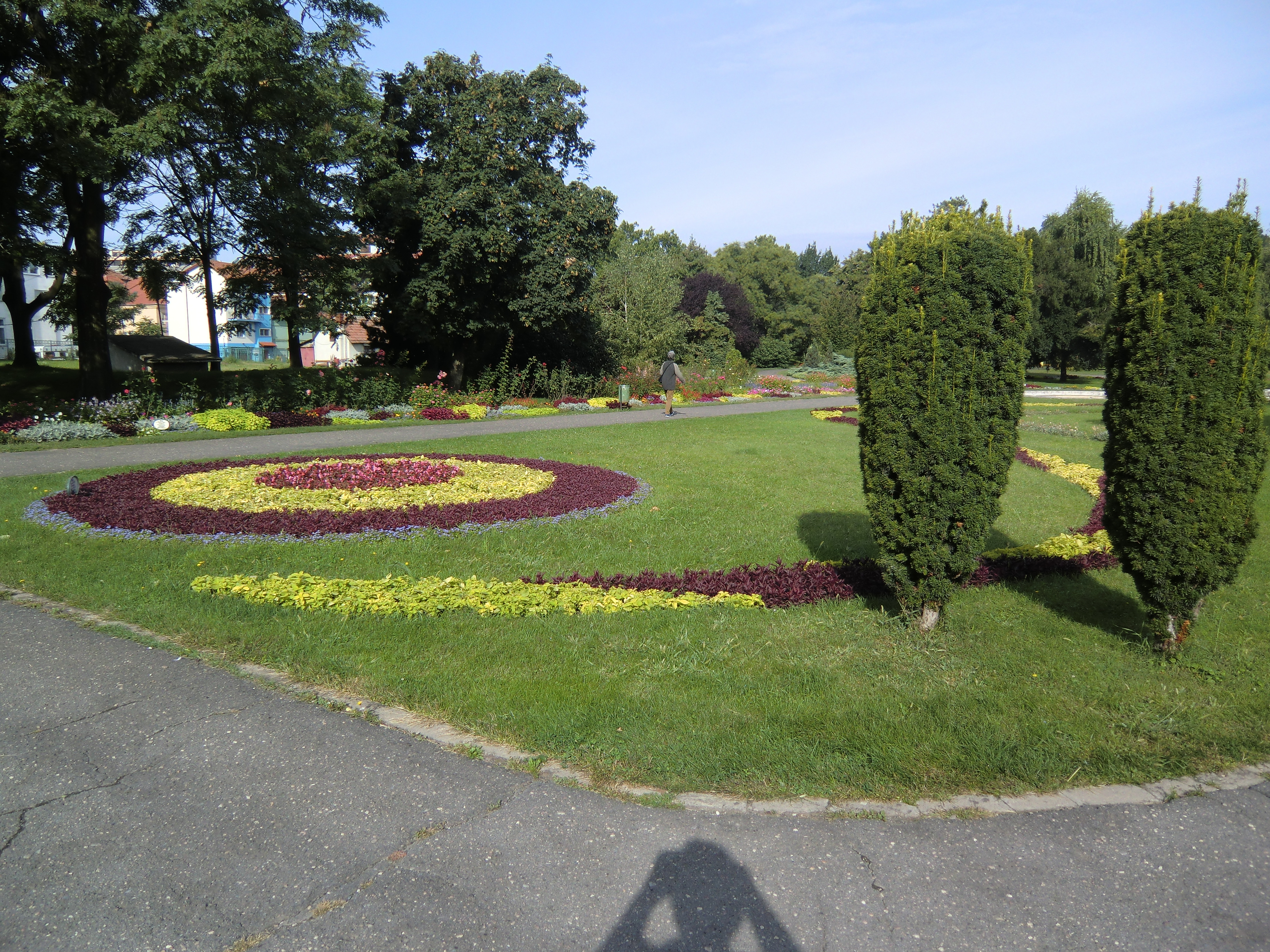 Botanischer Garten Timișoara